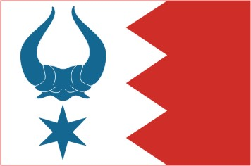 Vlksice